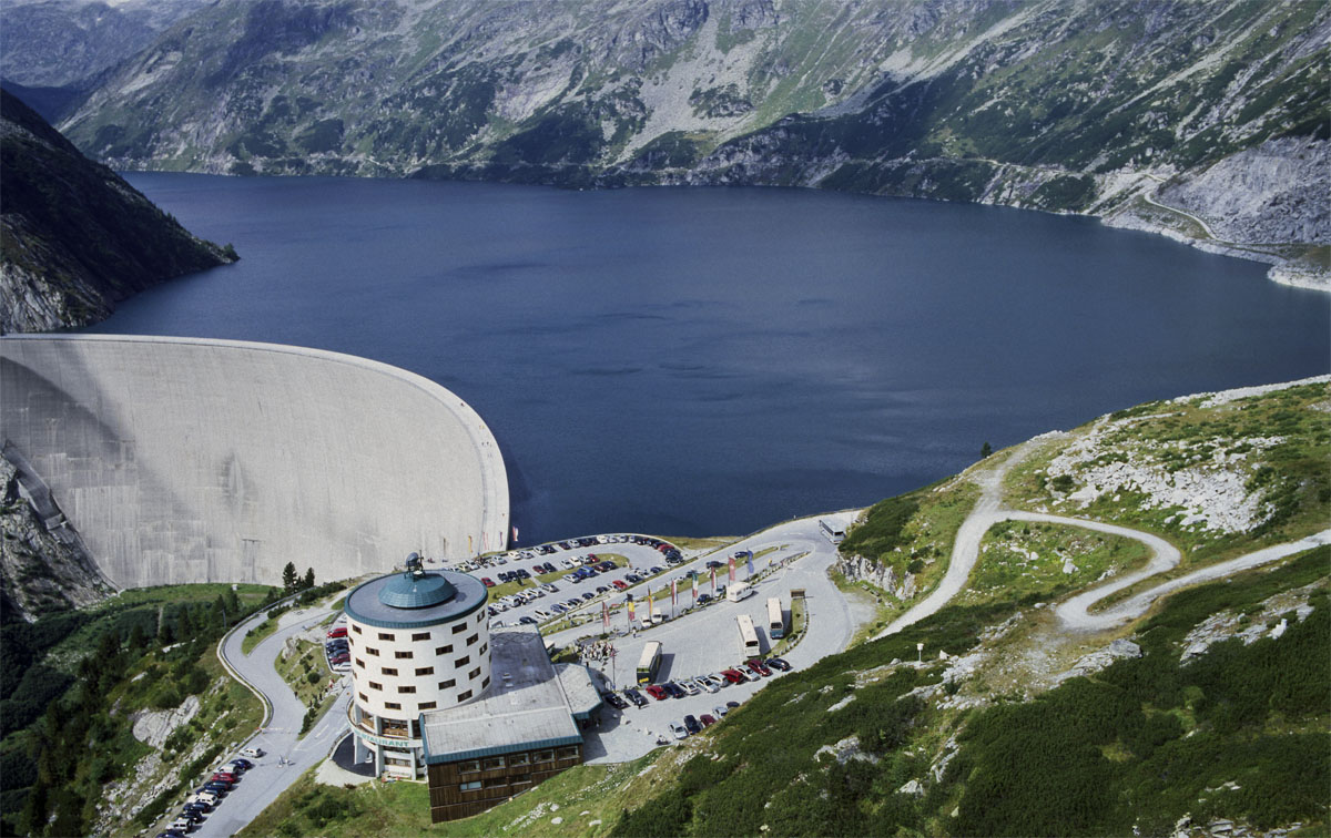 Jahresspeicher Malta, Kärnten